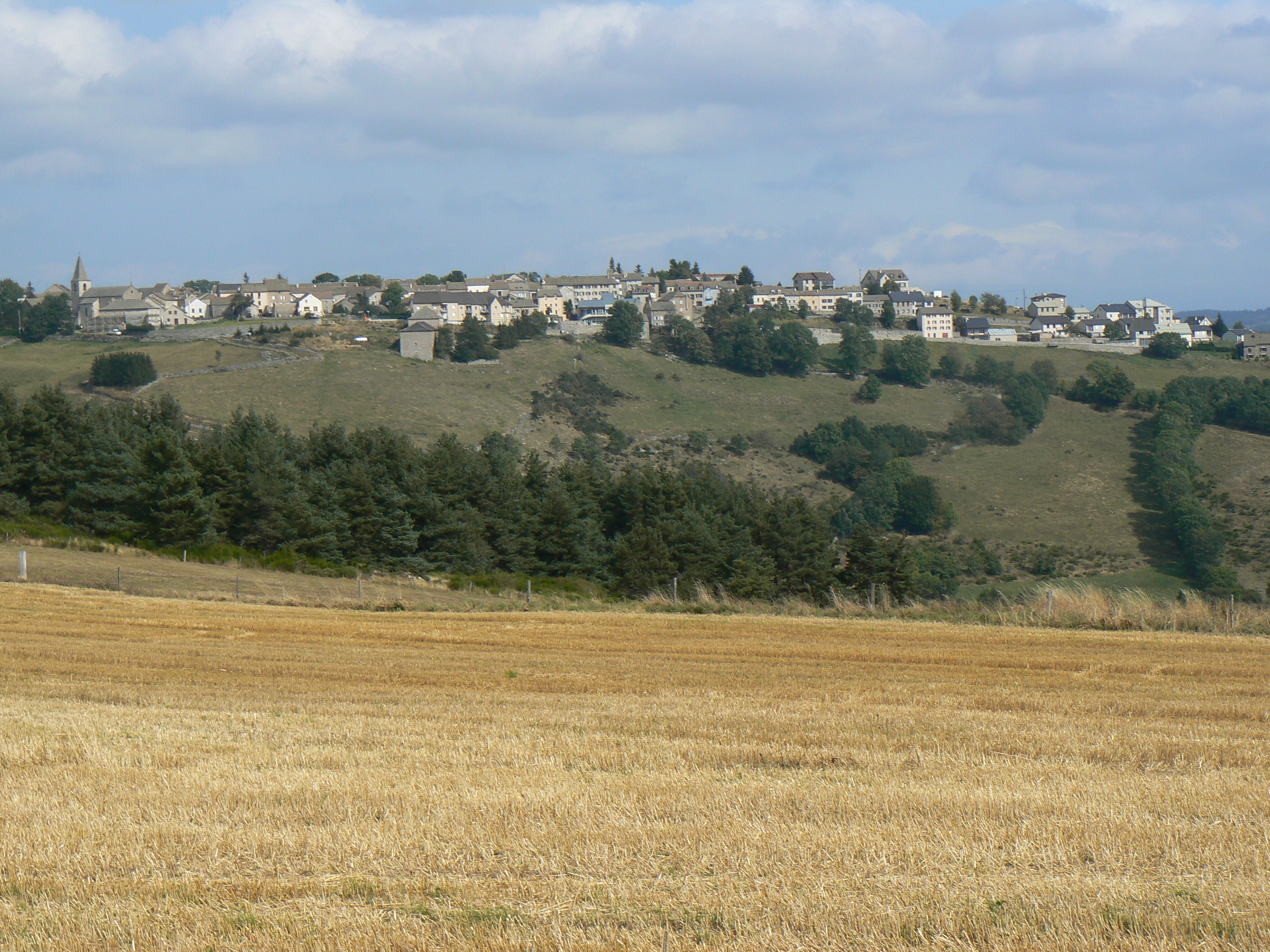 Vue générale de la commune de Châteauneuf-de-Randon en Lozère